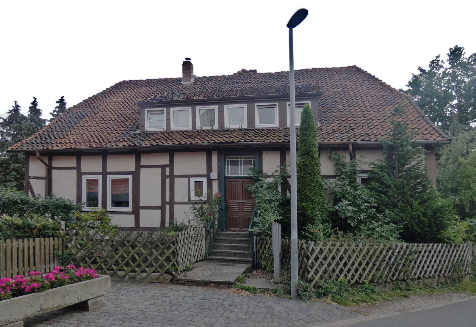 Ehemalige Schule. 1828 errichteter kleiner Wandständer auf hohem Sockel. Direkt neben der Kapelle, Teil einer kleinteiligen Gruppe baulicher Anlagen im Bereich um die Kapelle.